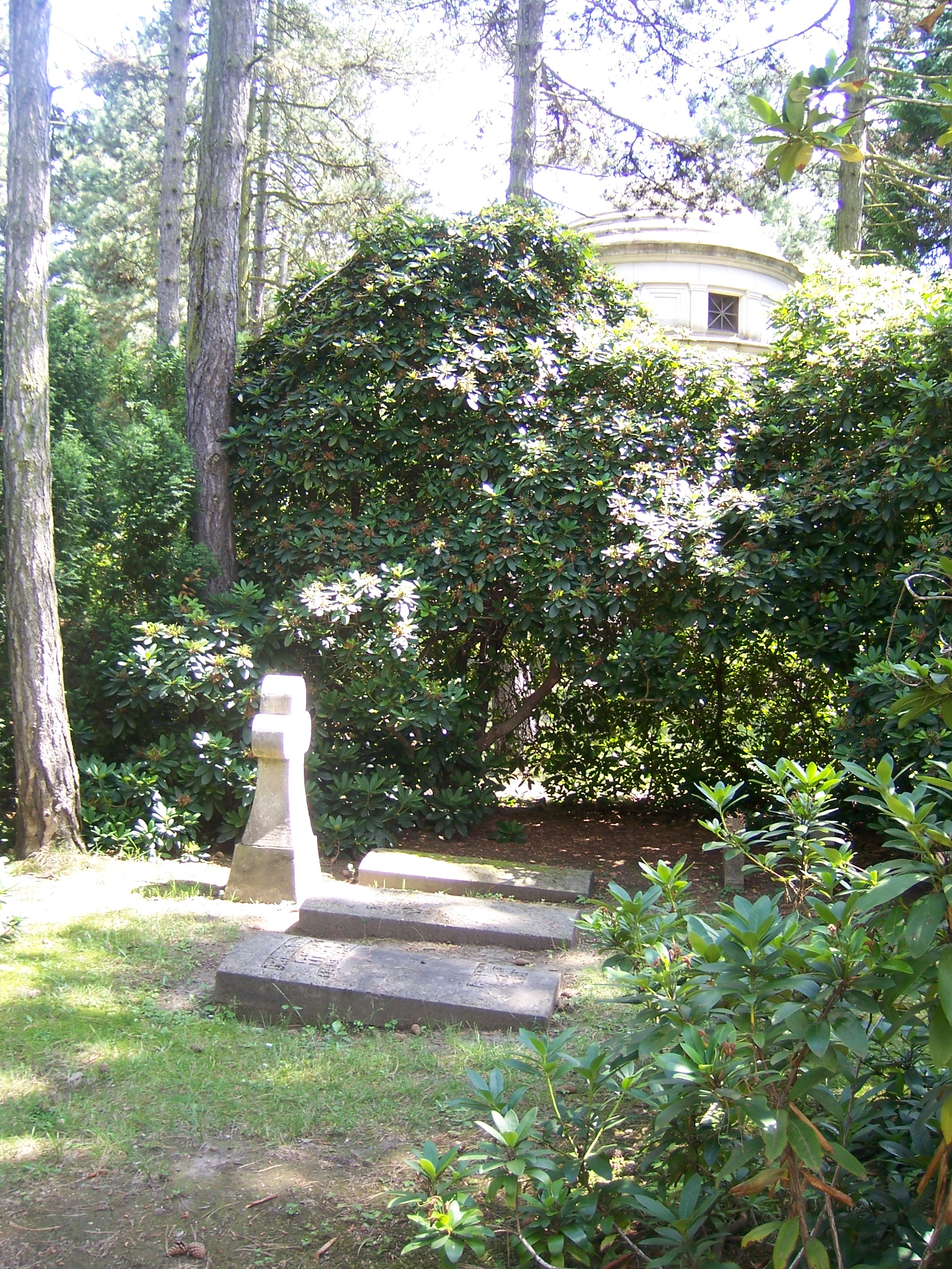 Grabmäler Ernst Traugott Fritzsche und Angehörige